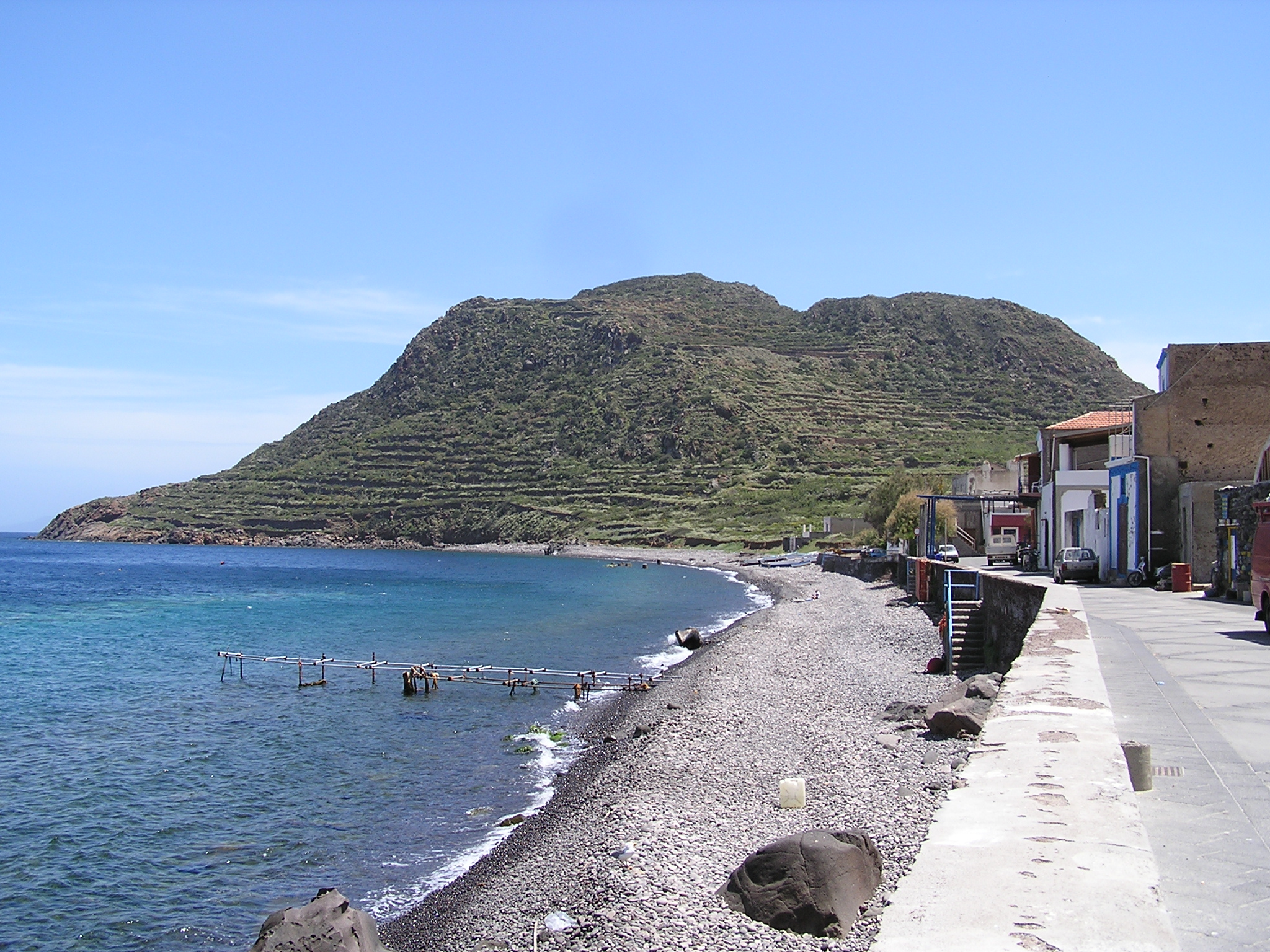 pohled na Capo Graziano z Filicudi Porto